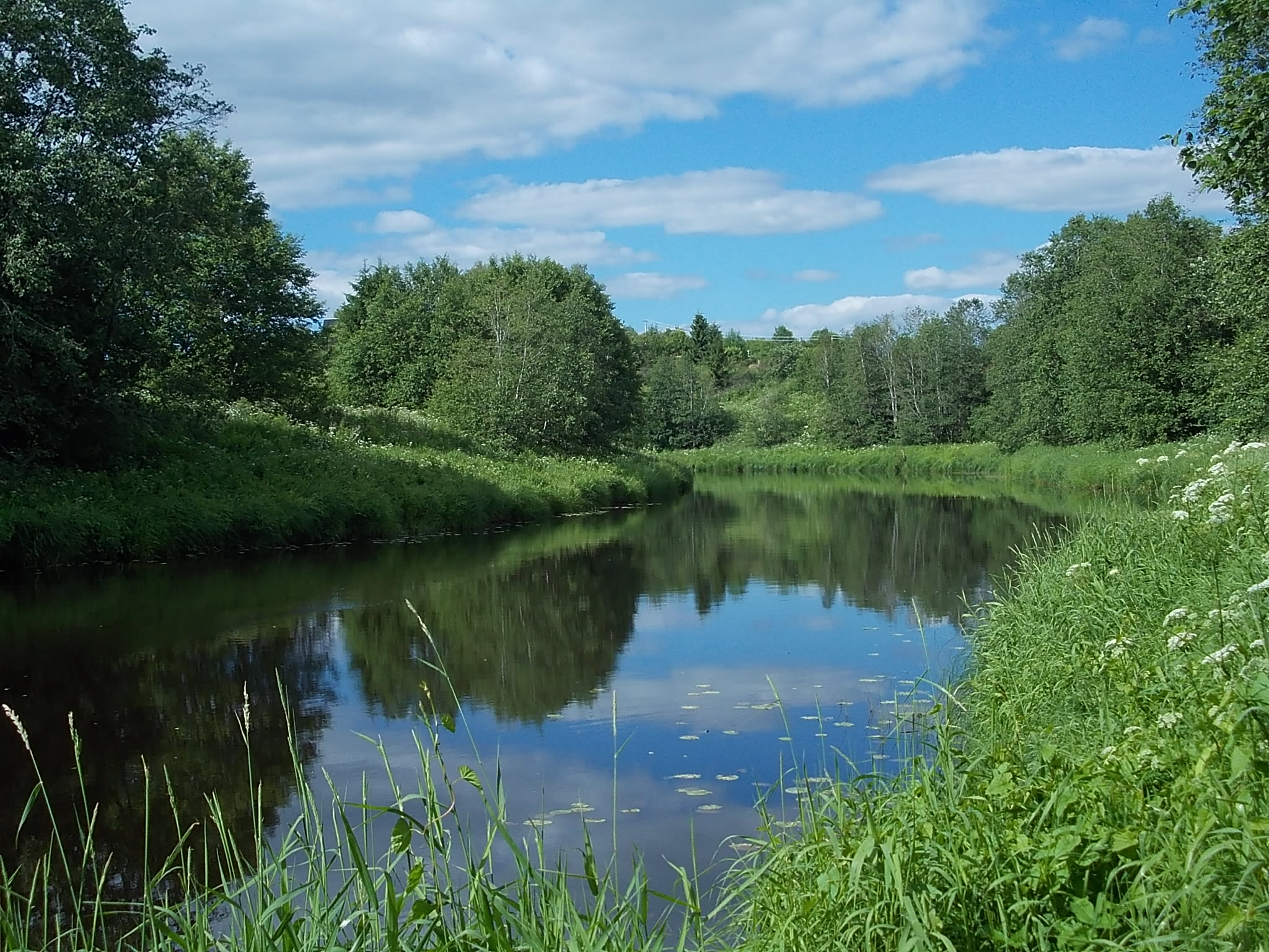 Река Лынна